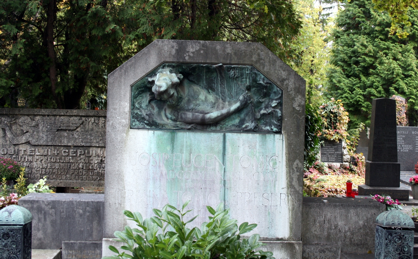 grob Josipa Eugena Tomića na Mirogoju u Zagrebu, Hrvatska